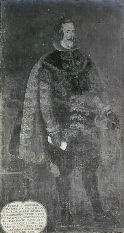 Retrato de Diego López Pacheco y Portocarrero, estaba ubicado en Ermita de la Virgen de Consolación de Torredonjimeno y fue destruido durante la Guerra Civil española (1936-1939). Es una réplica del retrato de Felipe IV realizado por Velázquez que se encuentra en la National Gallery y que fue realizado hacia 1635.